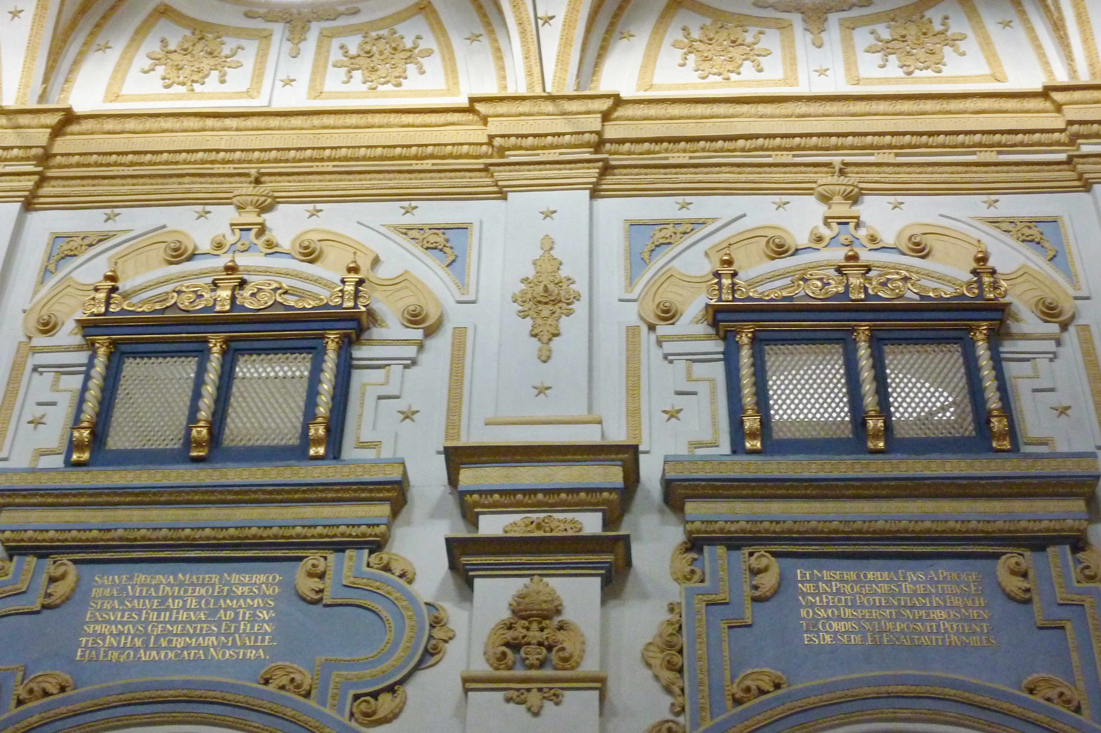 Katholische Pfarrkirche Mariä Himmelfahrt, ehemalige Klosterkirche des Zisterzienserinnenklosters Niederschönenfeld im Landkreis Donau-Ries (Bayern), von 1659 bis 1662 Wiederaufbau durch Konstantin Pader, Stuckdekor von Konstantin Pader, Obergeschoss des Seitenschiffs mit vergitterten Öffnungen (corretti)